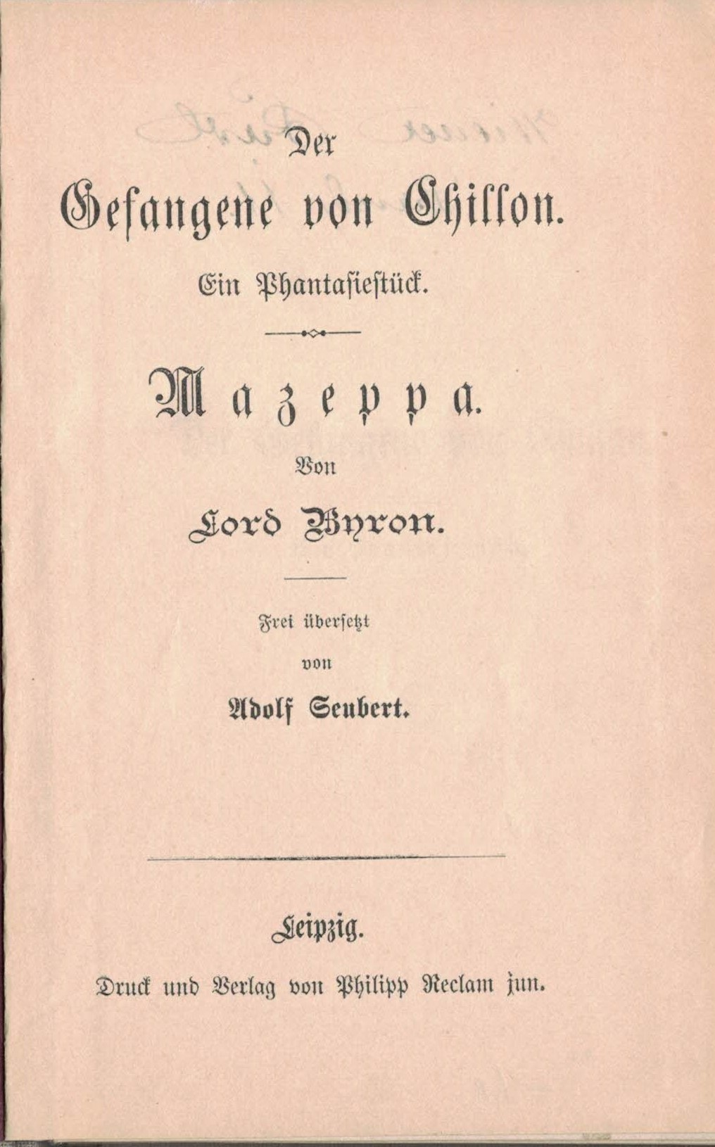 Lord Byron: Der Gefangene von Chillon, deutsche Ausgabe bei Reclam